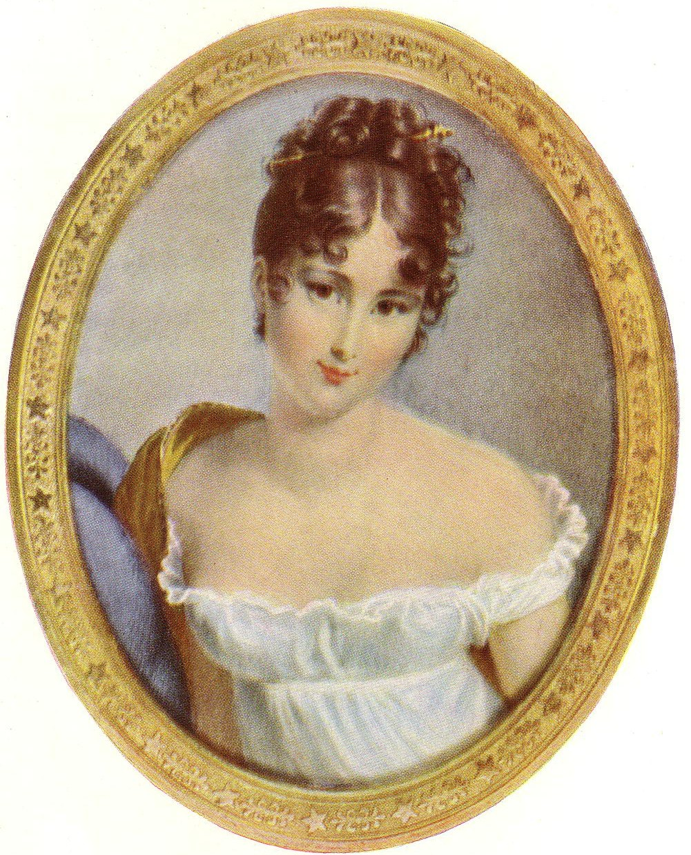 Portrait of Juliette Récamier